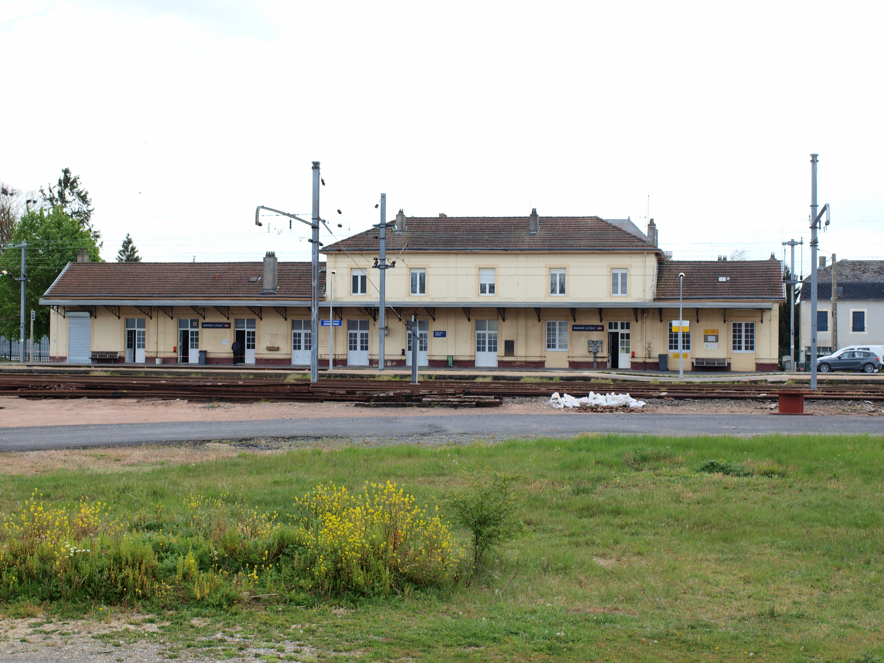 Lucquy-gare (Ardennes, France) ; la gare d'Amagne-Lucquy